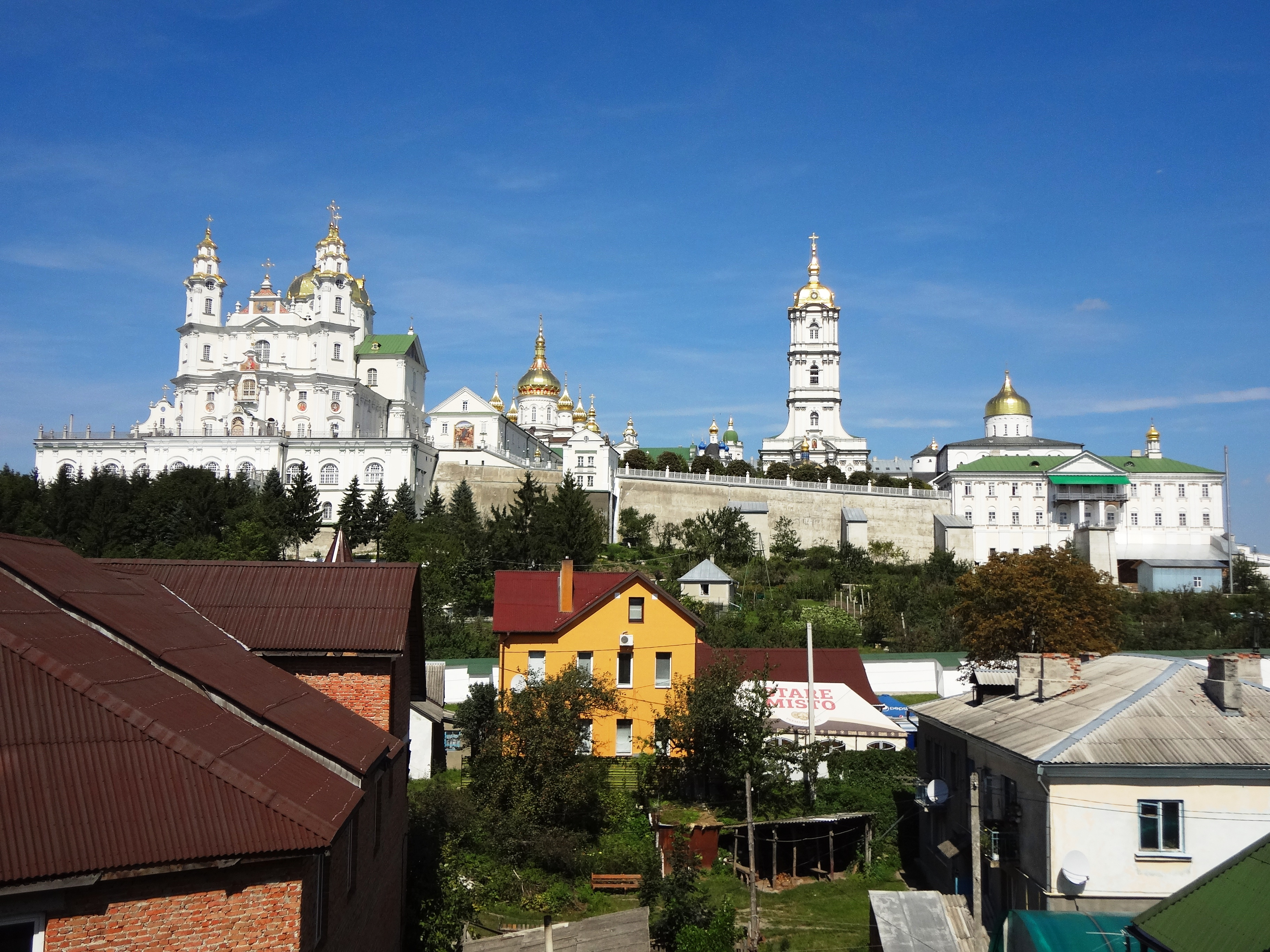 Почаївська лавра :, Почаїв, пл. Возз"єднання